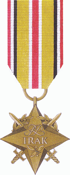 Gwiazda Iraku. Awers.